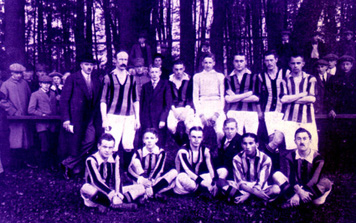 Vitesseselectie nog op Klarenbeek bij begin WOI